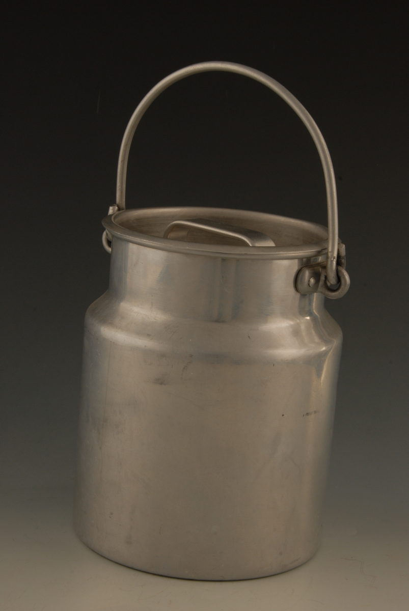 Melkespann i aluminium. Spannet er stemplet HØYANG 22 3 og er produsert på Nordisk Aluminiumindustri A/S i Holmestrand i perioden 1935-1970. Foto Holmestrand Aluminium museum, HAM.00625.